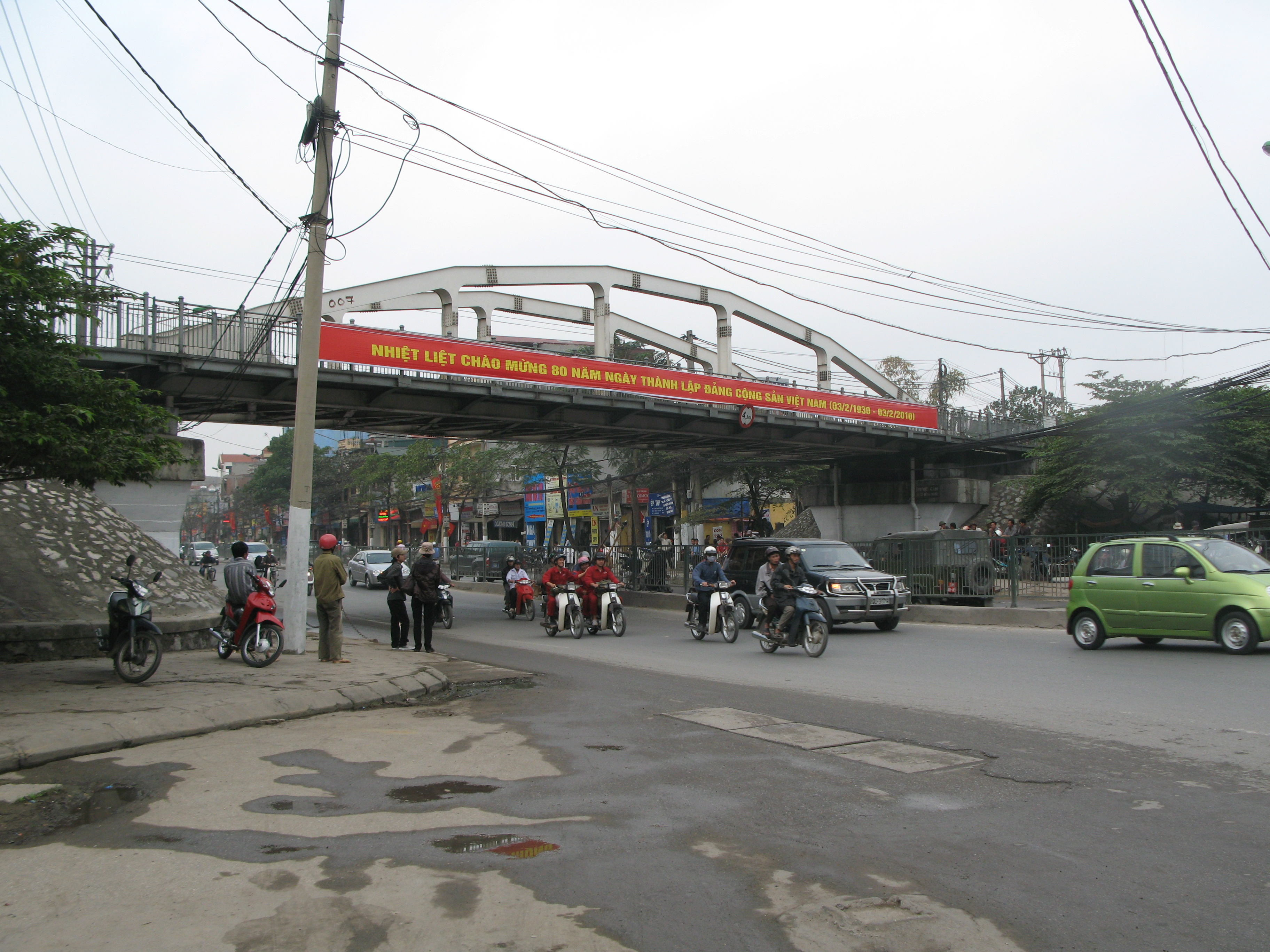 Cầu Chui, Gia Lâm , Hà Nội